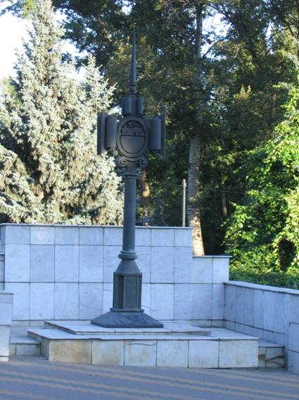 Липецк, Петровский проезд, памятник зарождению металлургии